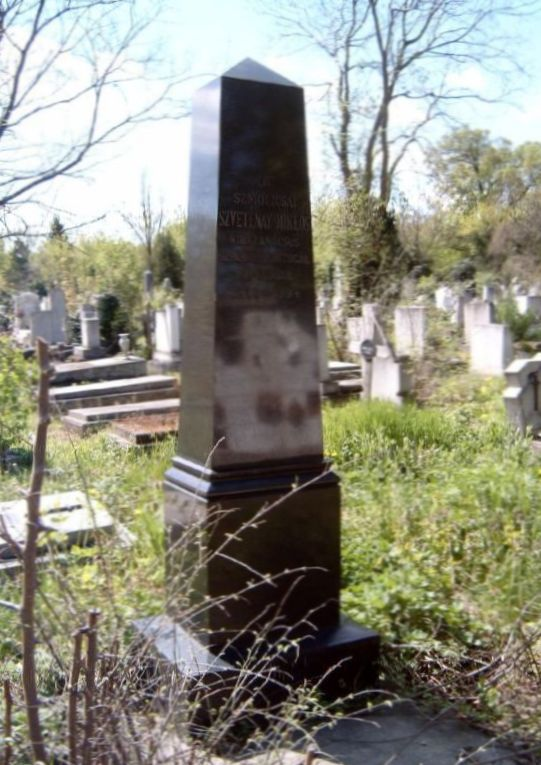 Szvetenay Miklós (Pest, 1833 – Speizing, Ausztria, 1894. május 24.) kereskedelmi és váltójogász sírja Budapesten. Új köztemető: 16/14-1-18/19